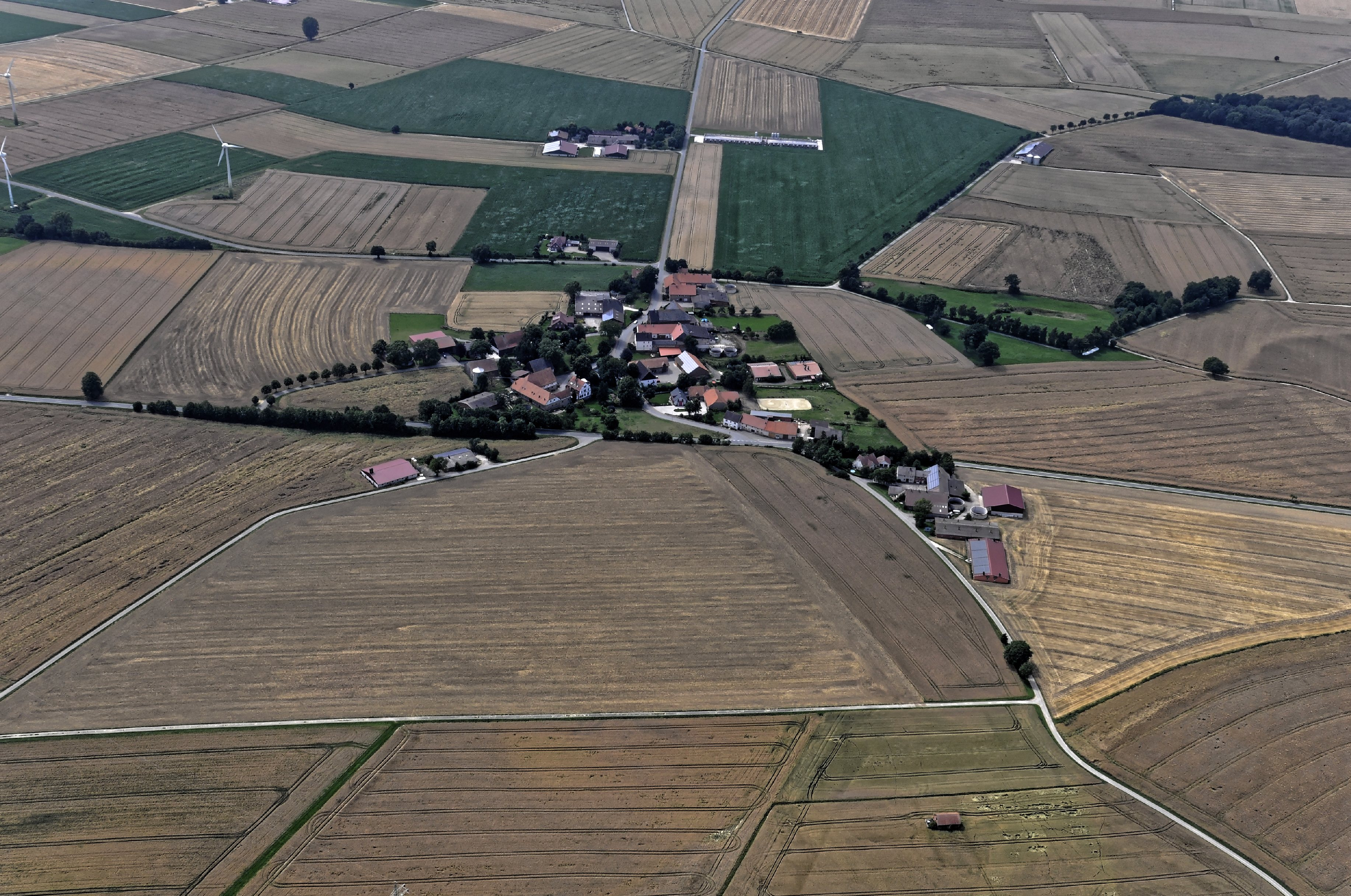 Bilder vom Flug Nordholz-Hammelburg 2015: Hampenhausen, Blick von Ostnordost